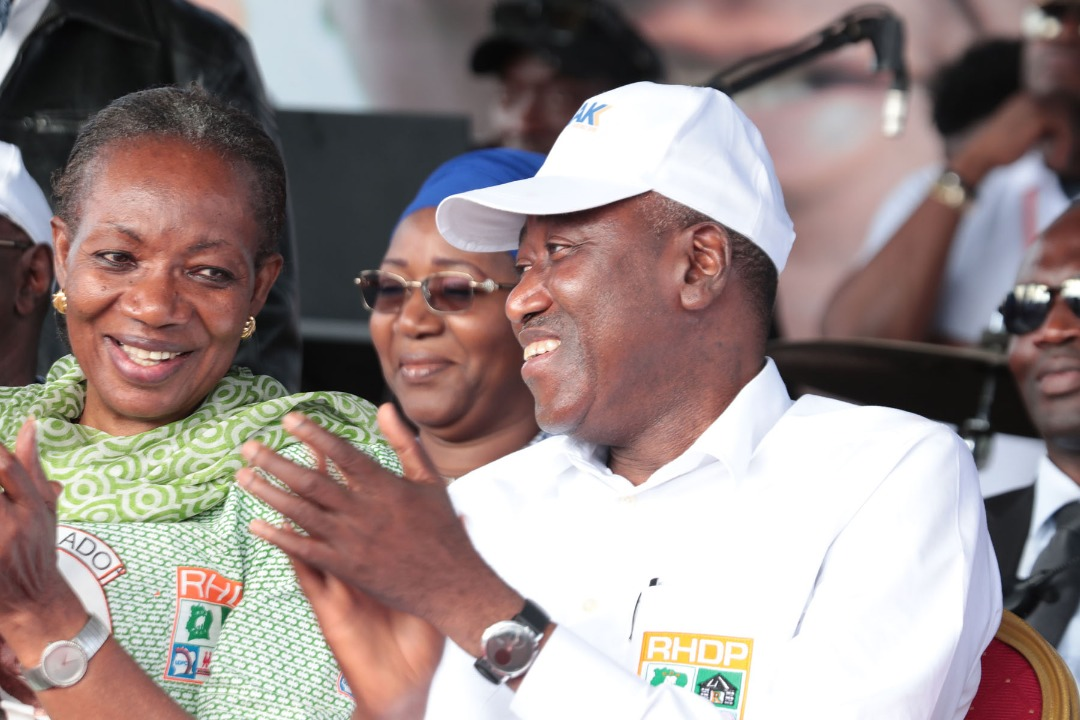 présence à un meeting